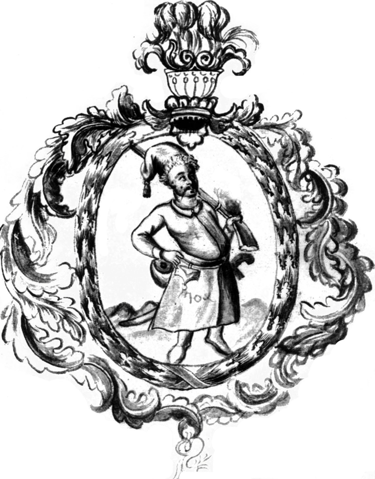 Герб Війська Запорозького з літопису Григорія Грабянки